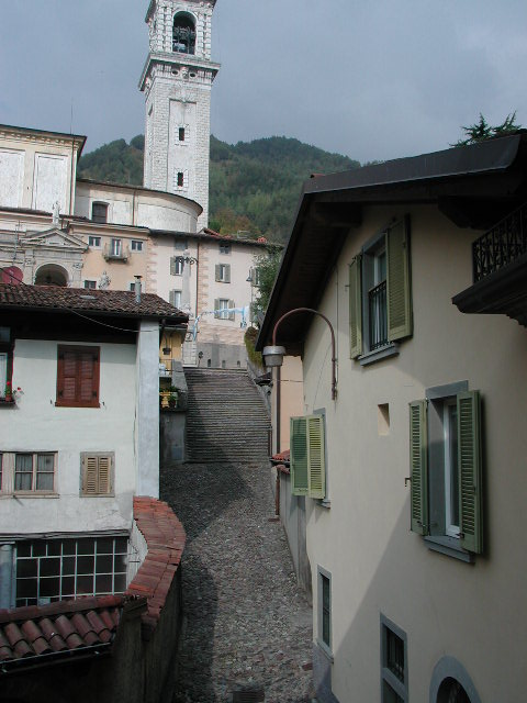 Clusone, via Franzini, Provincia di Bergamo, Italy foto fatta da me, ottobre 2005